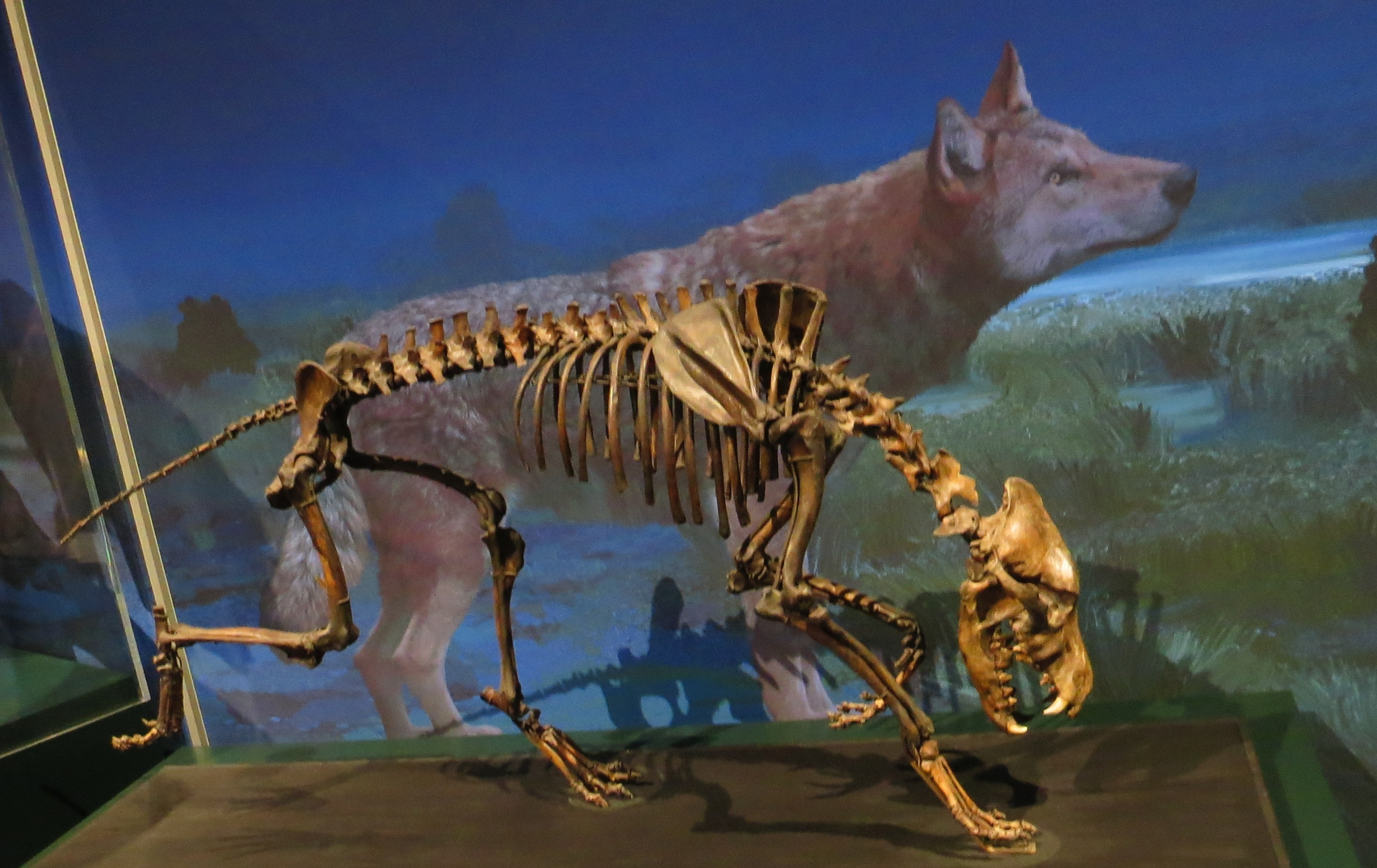 Fossil - Took the picture at Natural History Museum, Karlsruhe